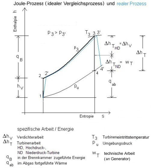 Gasturbinenprozess, Vergleichsprozesss und realer Prozess